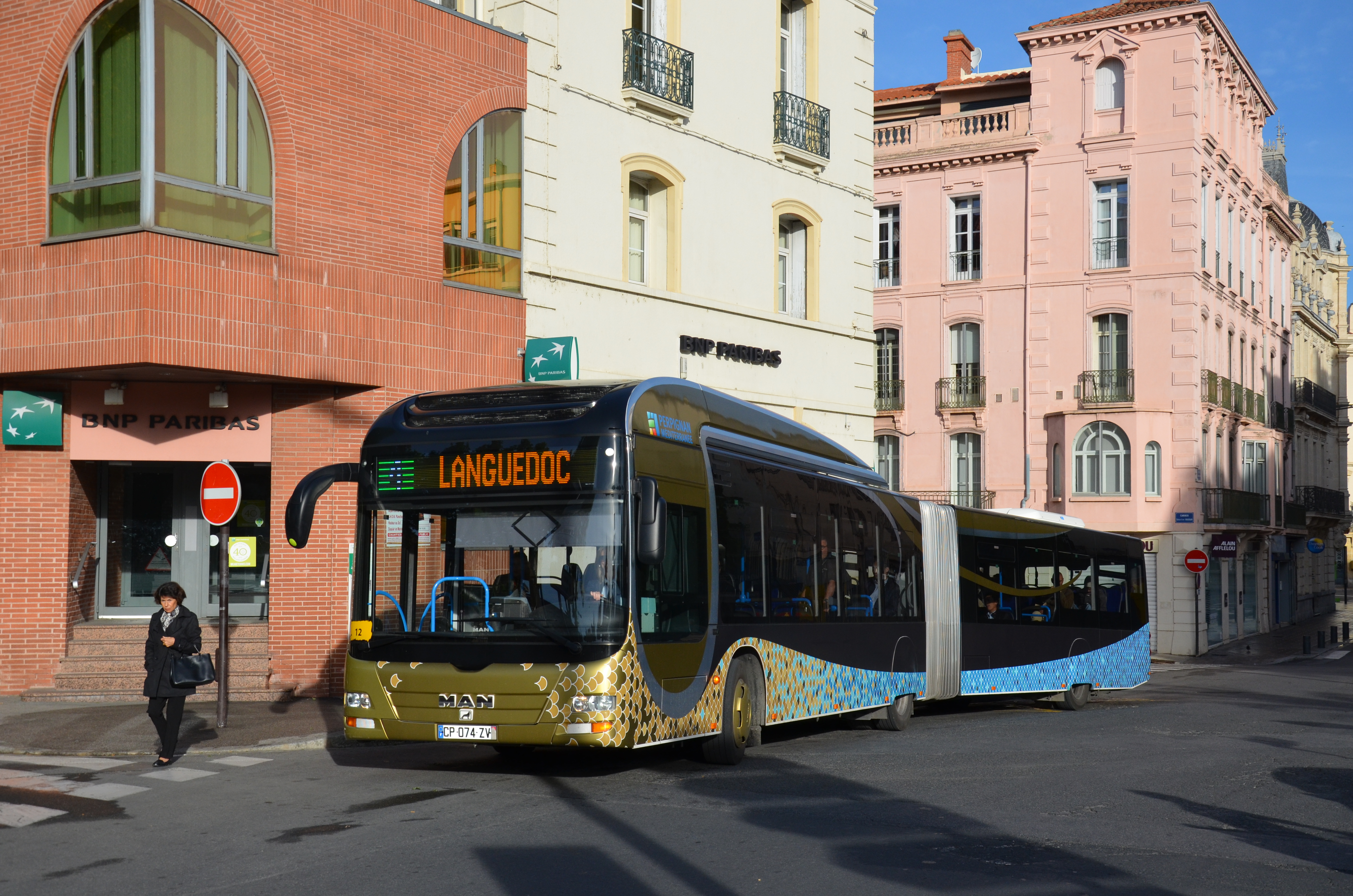 MAN Lion's City G n°12 à son arrêt Place Péri, sur le réseau CTPM de Perpignan.